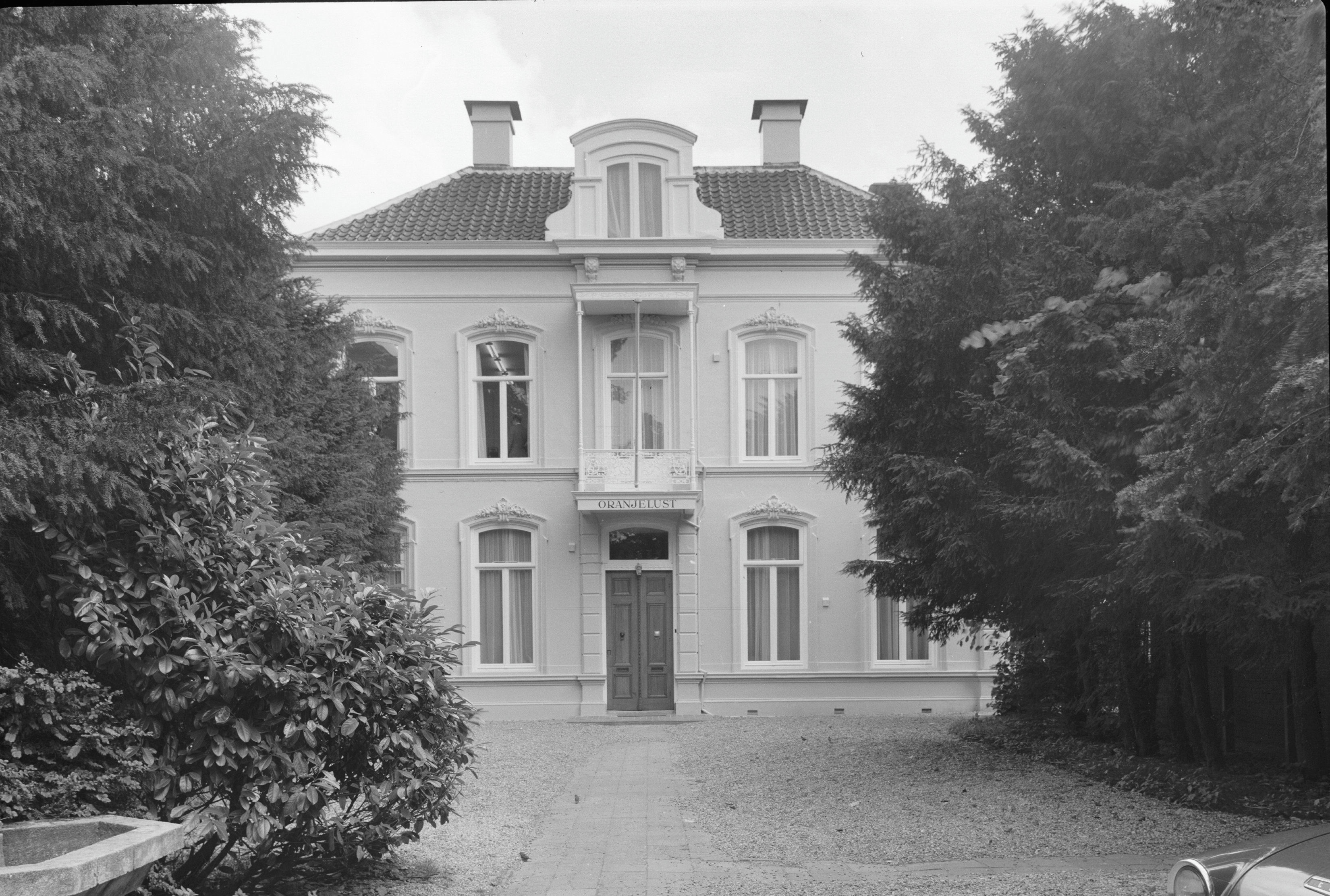 Oranjelust